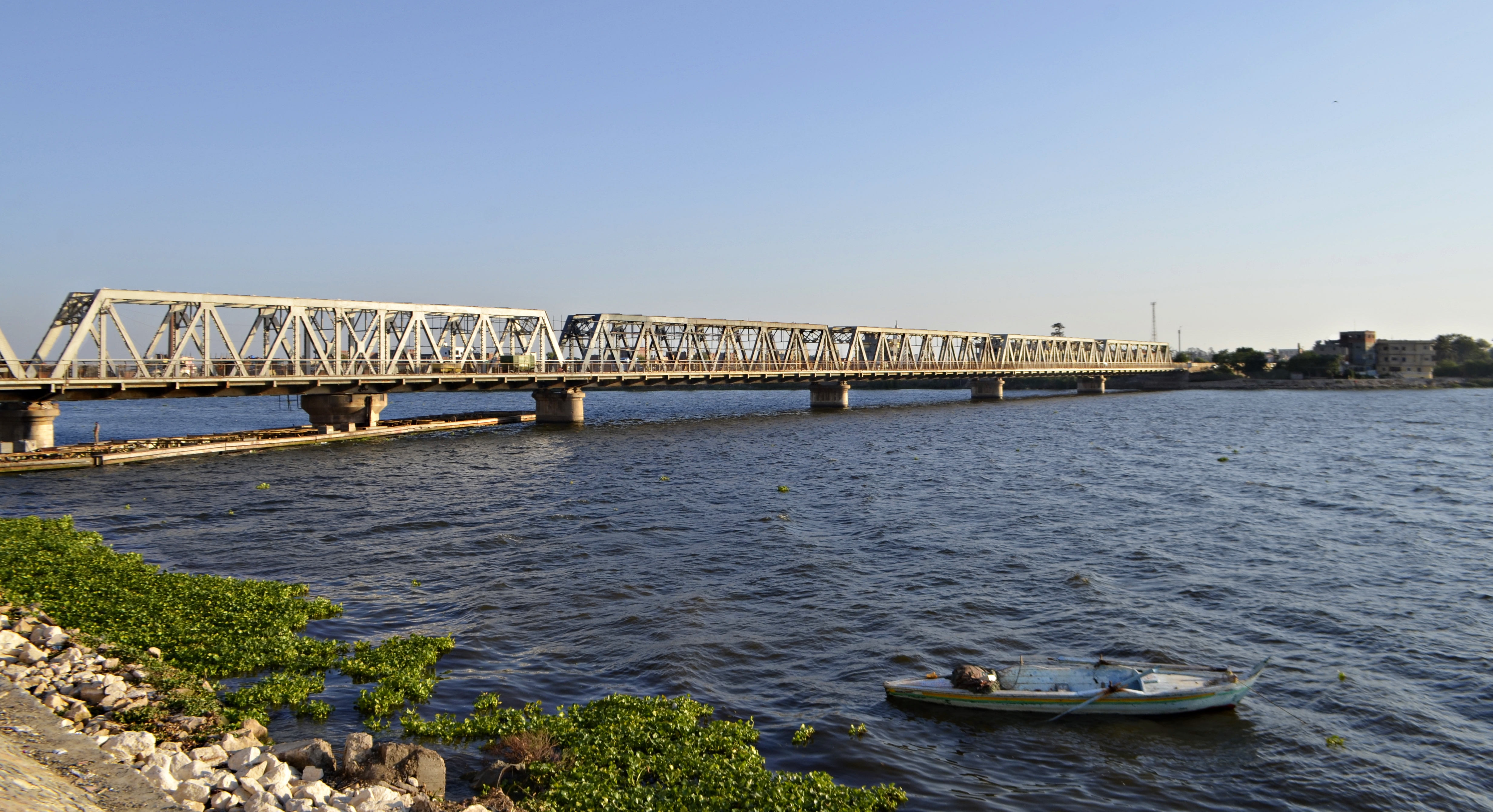 كوبري دسوق القديم، دسوق، مصر